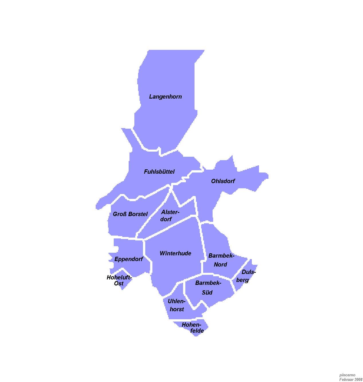 Stadtteile im Bezirk Hamburg-Nord